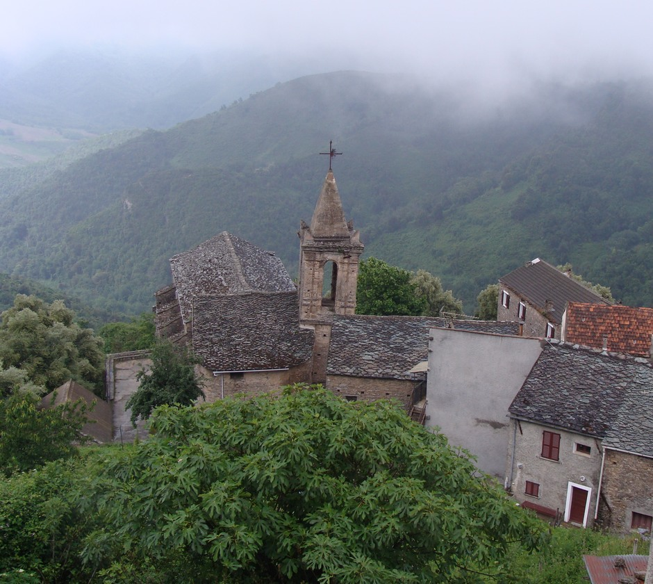 Le hameau de Velfasca, commune de Zalana.